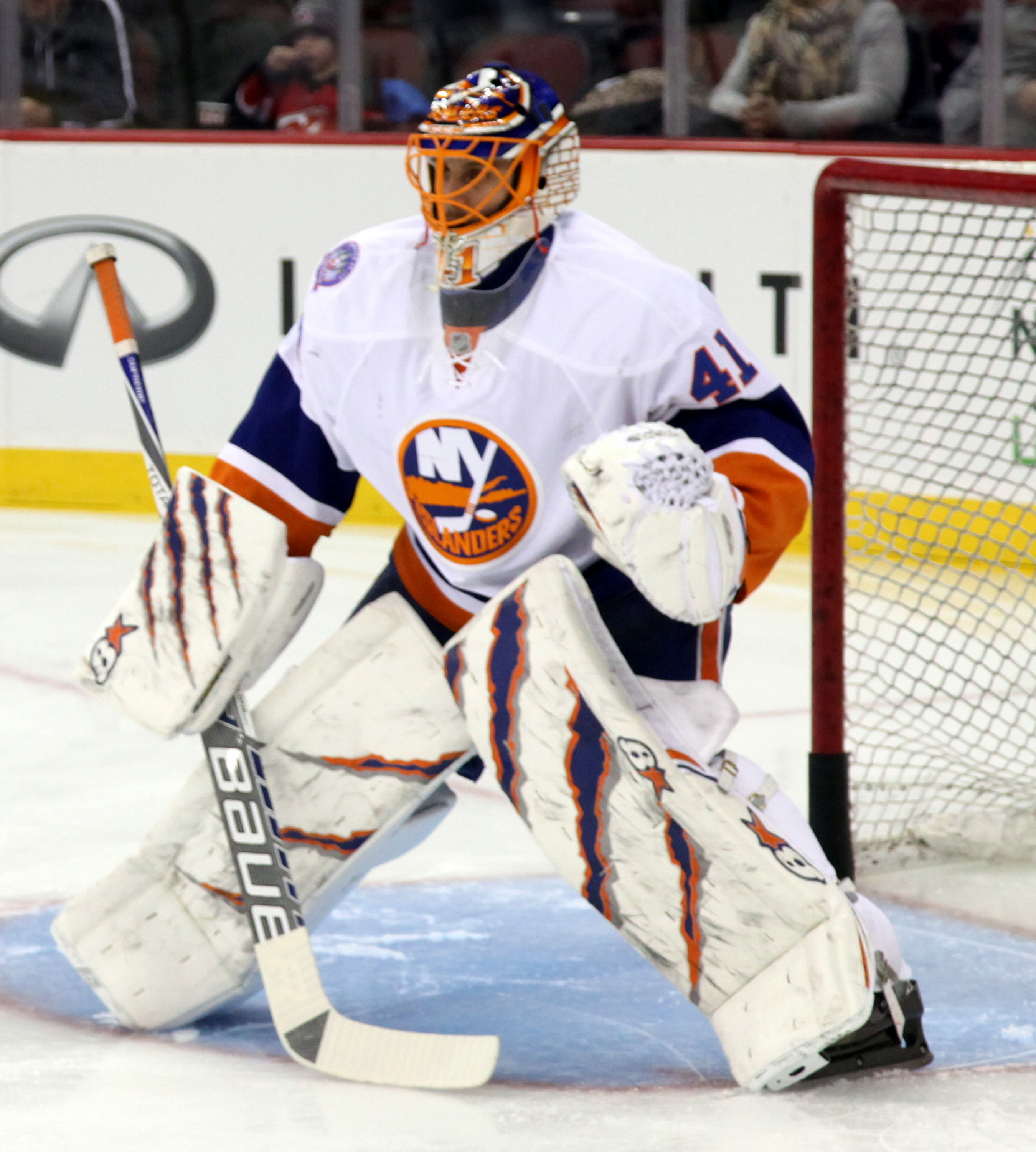 Jaroslav Halak in January 2015.